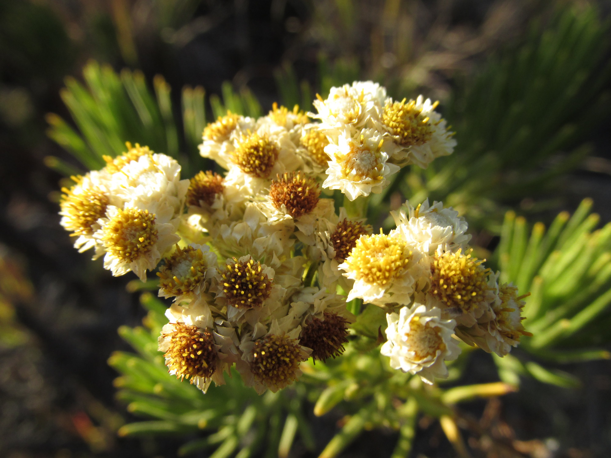 Bunga Senduro (Anaphalis javanica)